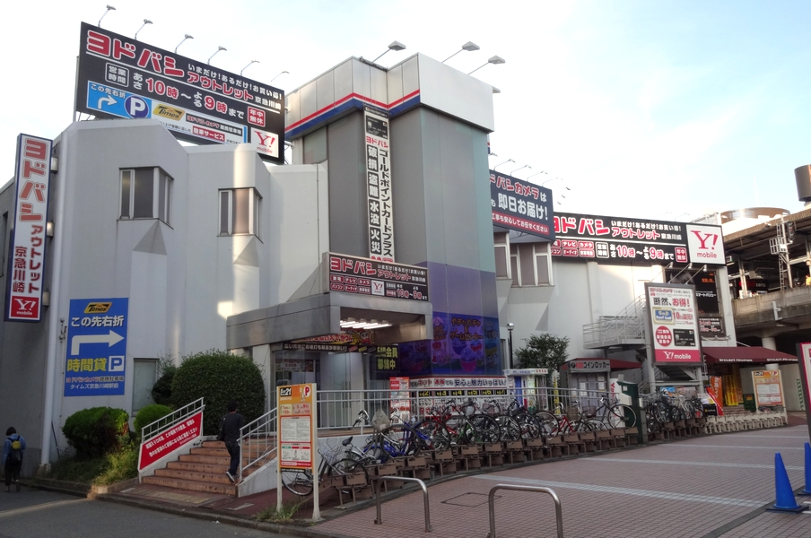 Yodobashi Outlet Keikyu Kawasaki (Kawasaki, Kanagawa Prefecture , Japan)